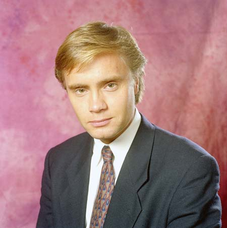 Max Westerman